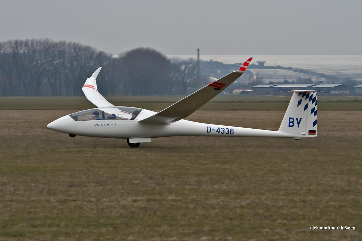 PribinaCup.Nitra 2013.Slovakia.